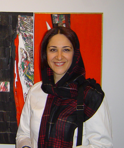 مهشید میرمعزی مترجم ایرانی